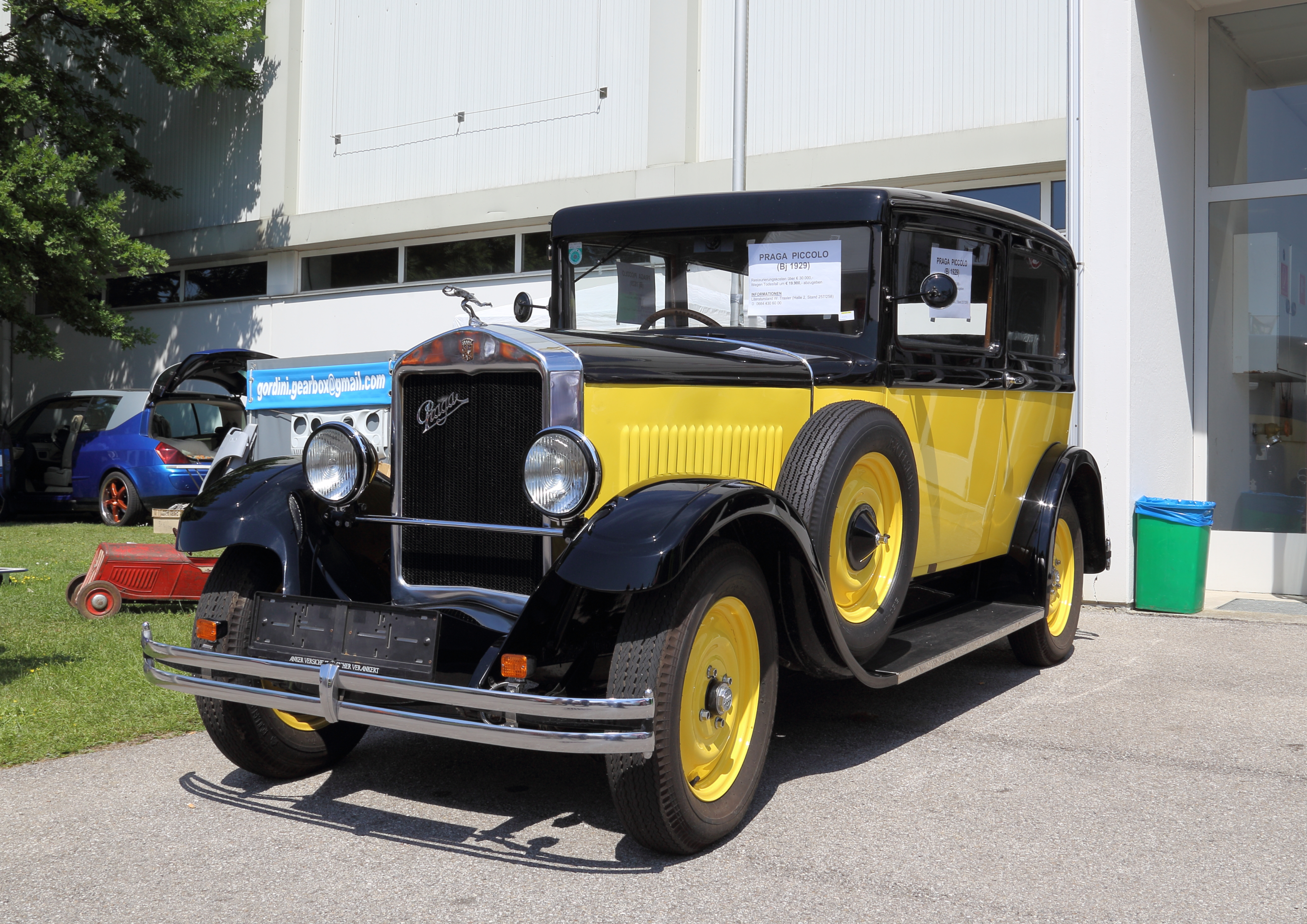 Ein restaurierter Praga Piccolo, Bj. 1929, bei der Oldtimermesse 2014 in Tulln, der zum Verkauf angeboten wird.